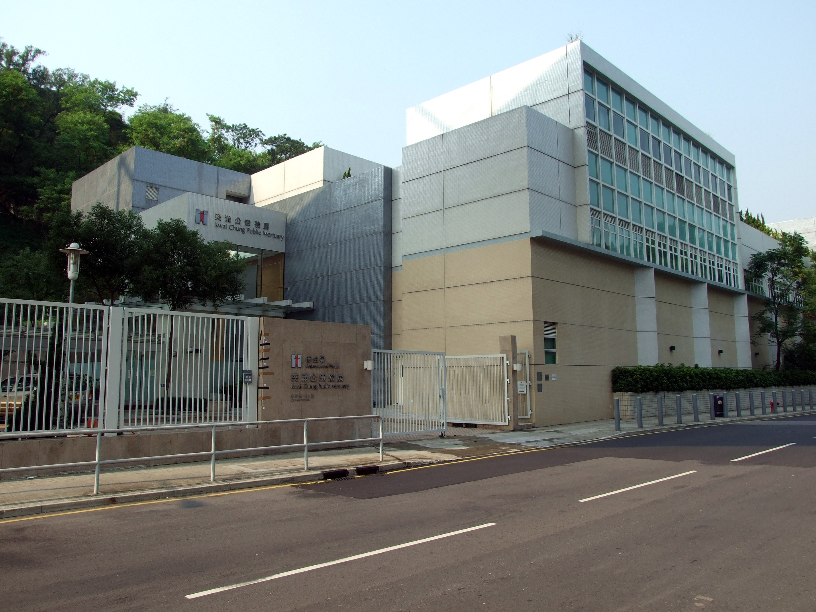 中文（香港）: 葵涌公眾殮房